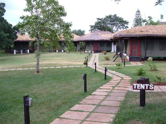 Kenya - Kisumu - Koboko point - l'hotel camping